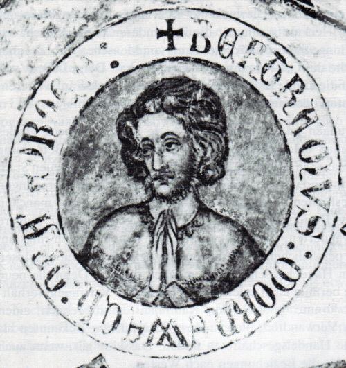 Bertram Morneweg († 1286), Lübecker Kaufmann und Ratsherr. Wandmalerei im Heiligen-Geist-Hospital.